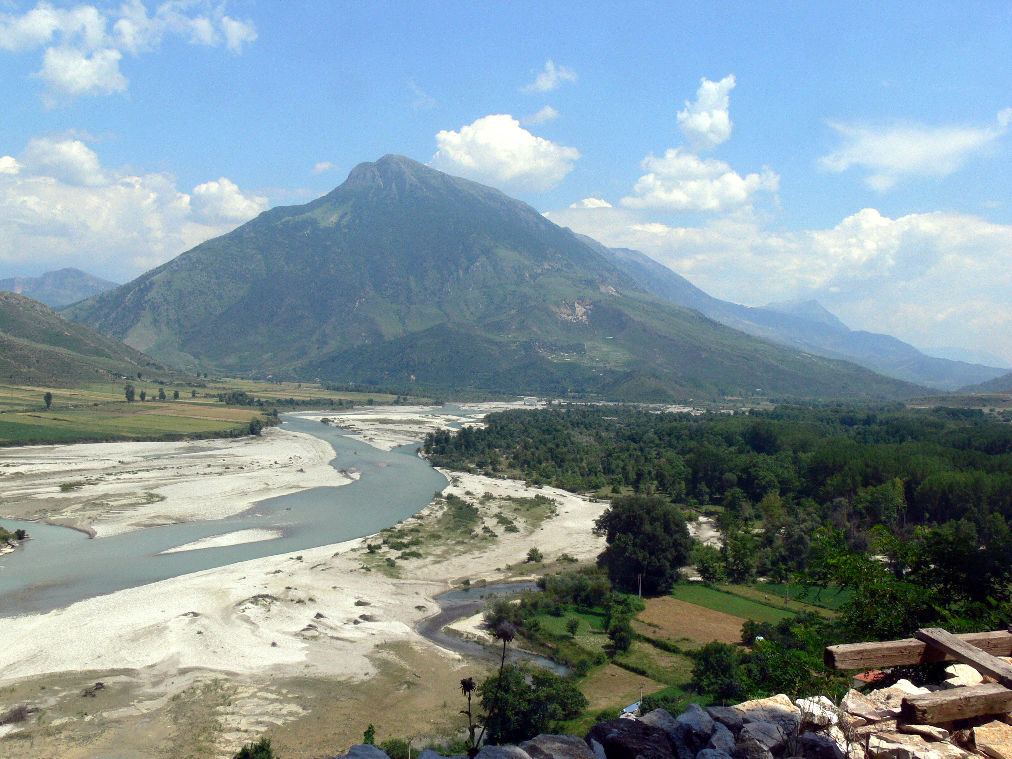 Albánské hory nedaleko Gjirokasteru a Tepelene, dosahují výšky zhruba kolem 2000 m